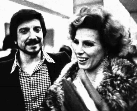 Italian actor Gigi Proietti and singer Ornella Vanoni